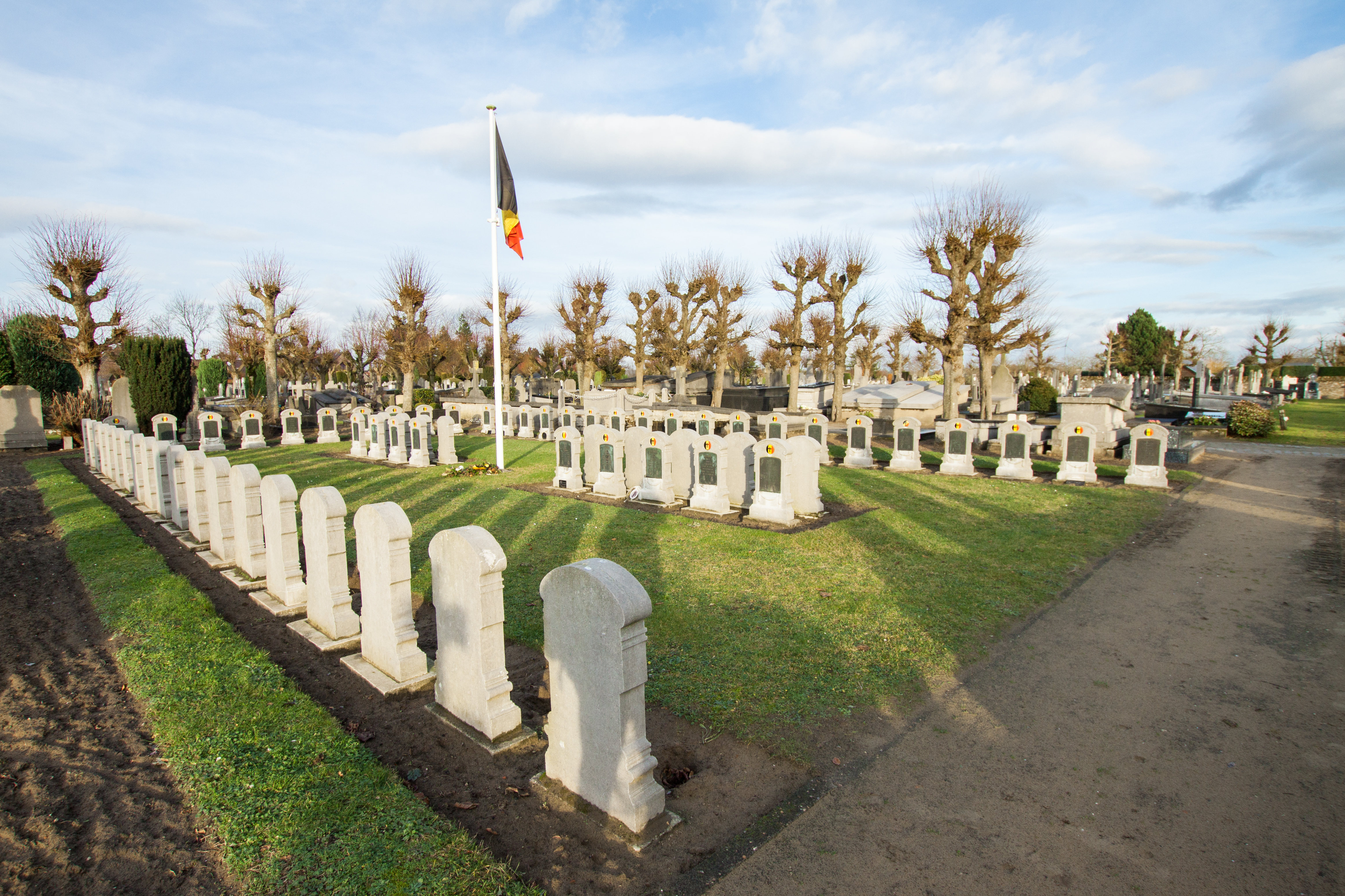 Maldegem Communal Cemetery